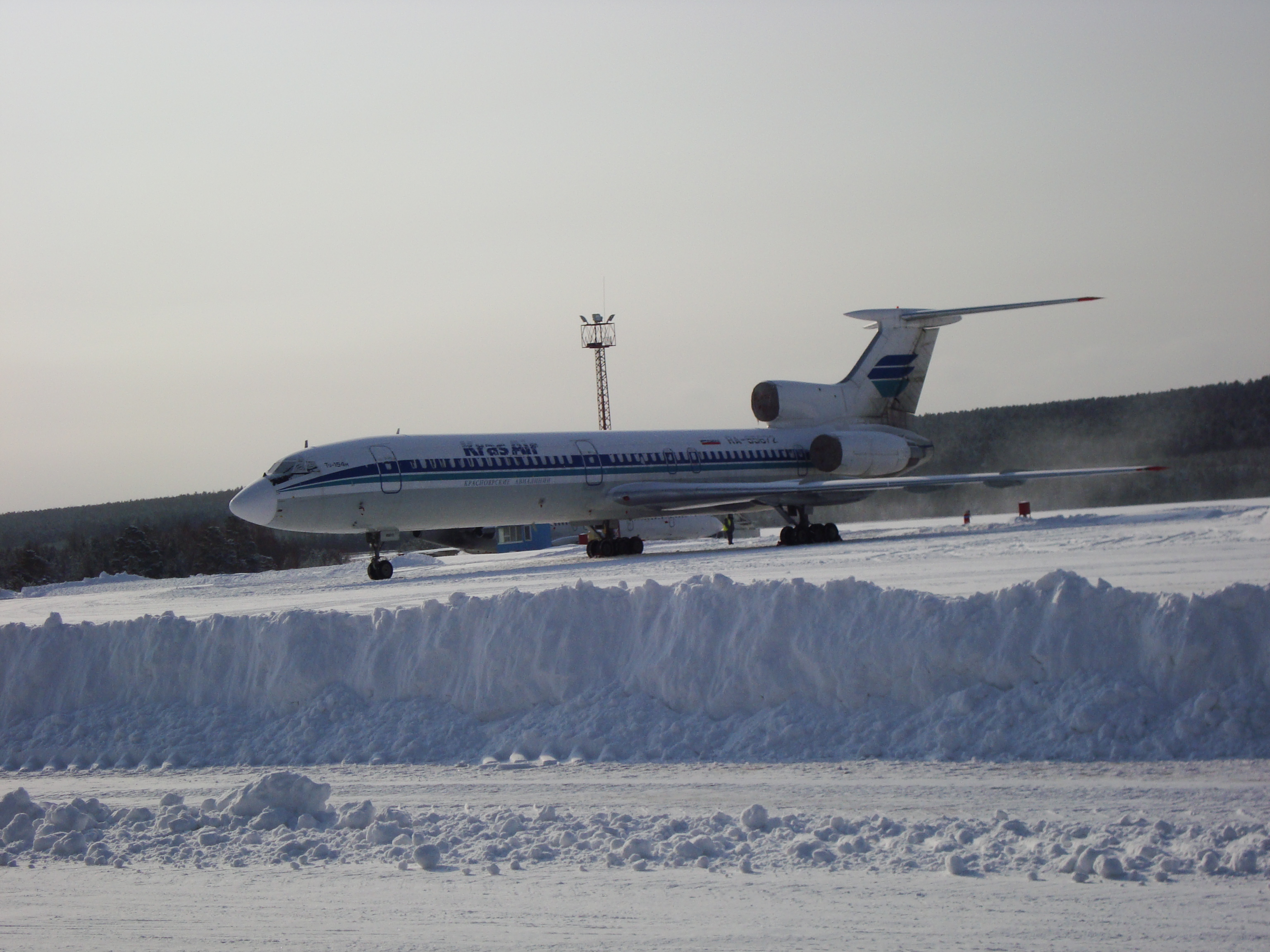 Ту-154 в аэропорту Емельяново.